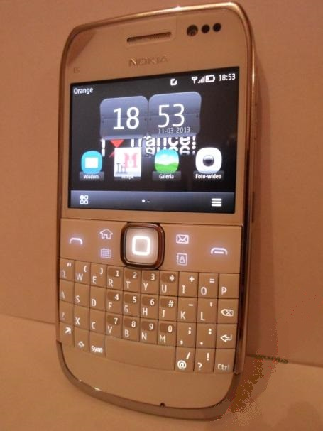 Nokia E6 biała symbian